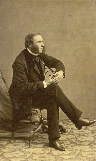 Владимир Иванович Мятлев (1827—1900), сын известного поэта И. П. Мятлева.